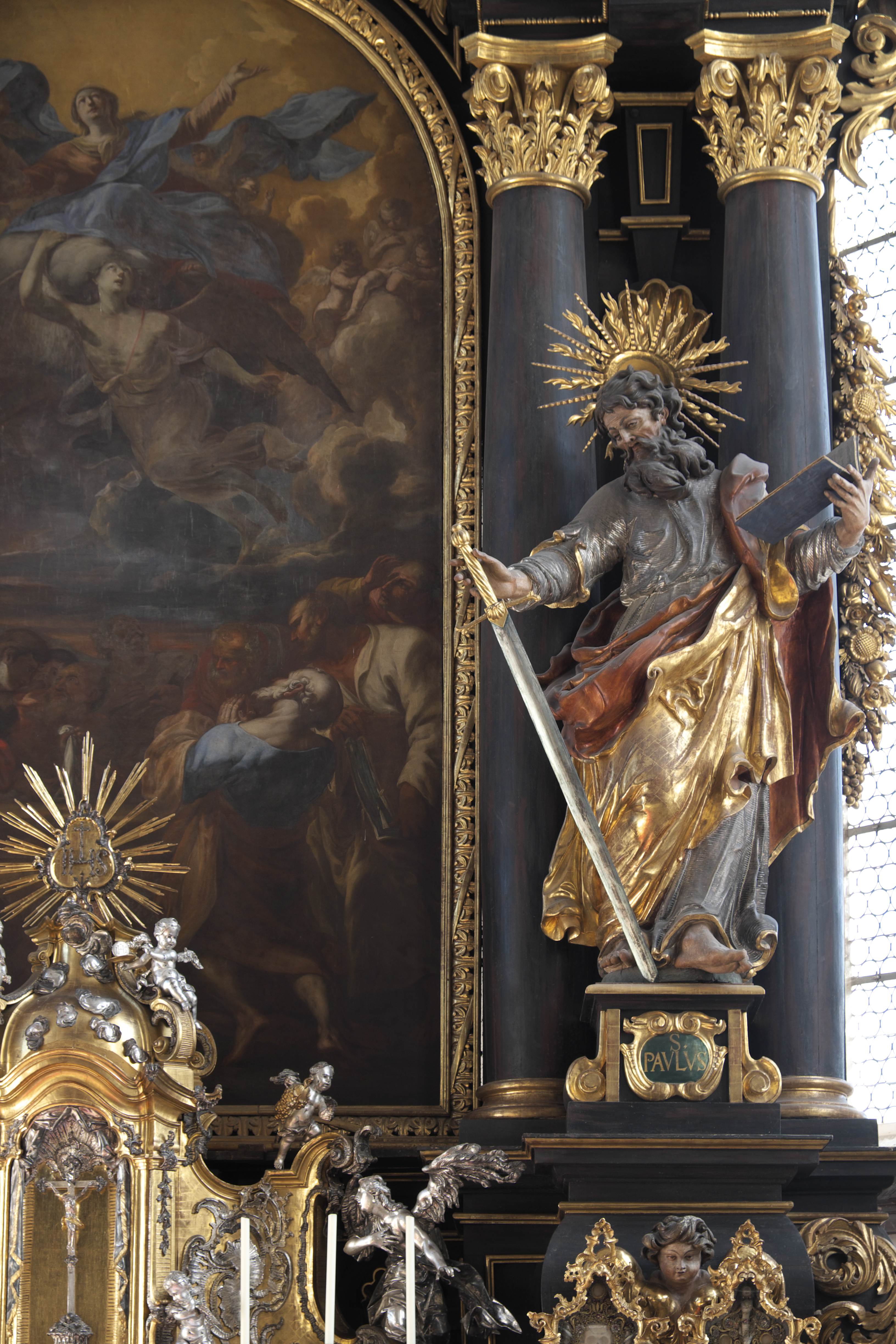 Katholische Stadtpfarrkirche Mariä Himmelfahrt in Höchstädt im Landkreis Dillingen an der Donau (Bayern), Hauptaltar von 1695, Skulptur des Apostels Paulus von Johann Baptist Libigo